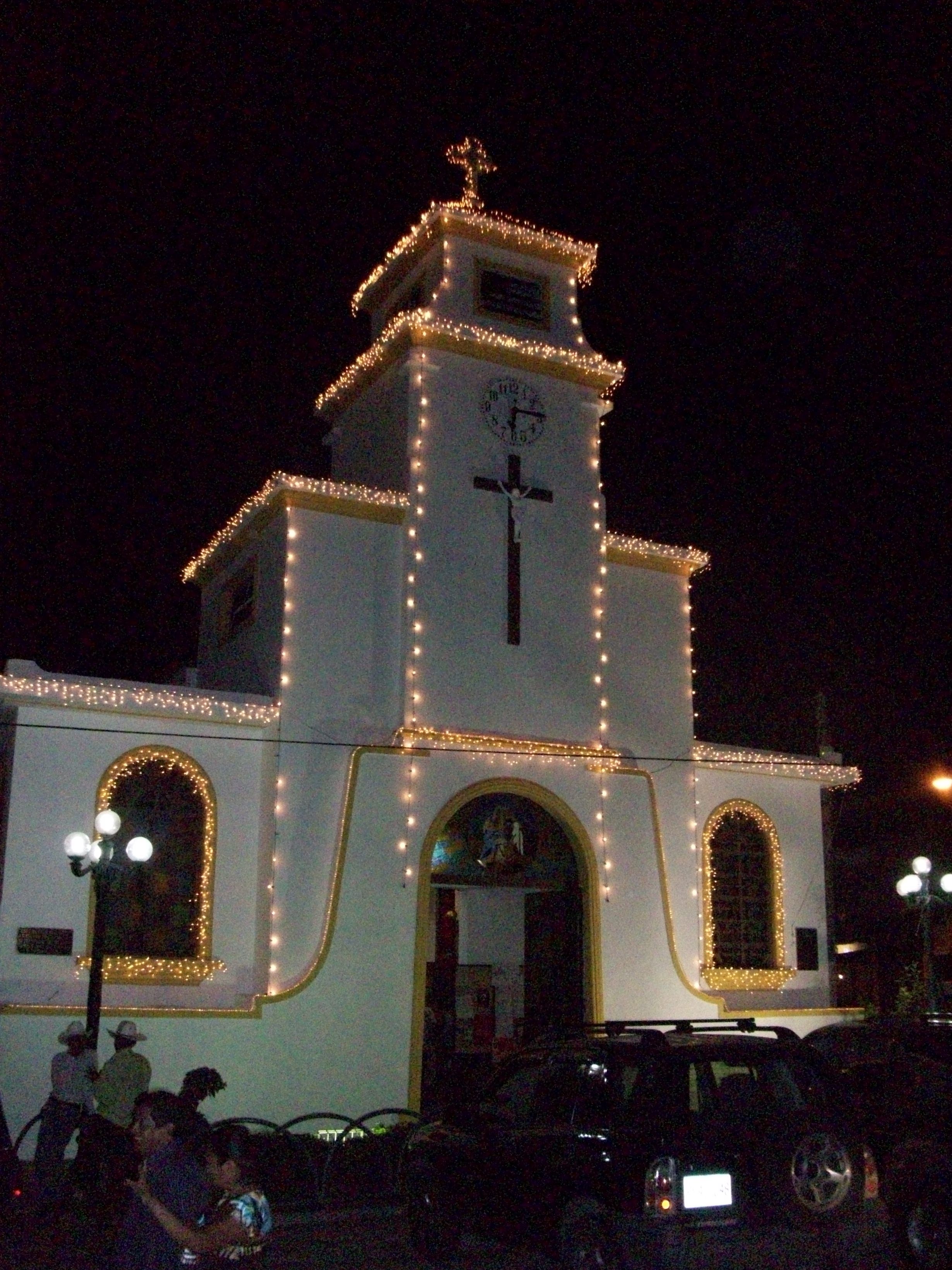 Fotografía de la Iglesia de los Santos Niños Inocentes en el municipio de Antiguo Cuscatlan, Departamento de La Libertad, El Salvador